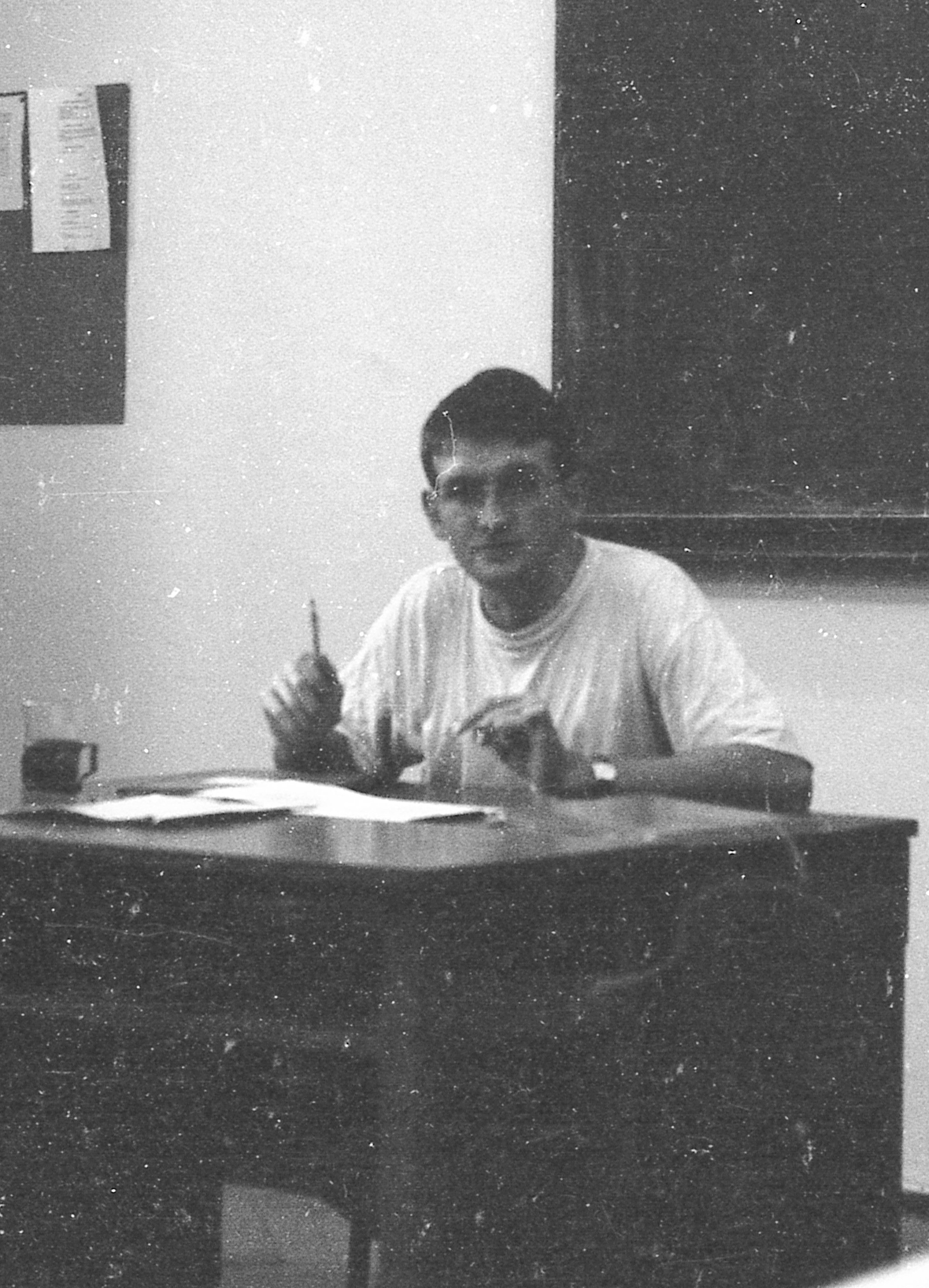 Cezary Geroń, polski poeta, tłumacz i nauczyciel. Zdjęcie zrobione w jednej z sal I SLO przy ul. Bednarskiej w Warszawie aparatem Praktica LD2/PLC3 na błonie Ilford 400 w roku 1997. Skan z uszkodzonego negatywu w roku 2010.